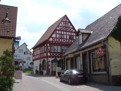 selbst fotografiert